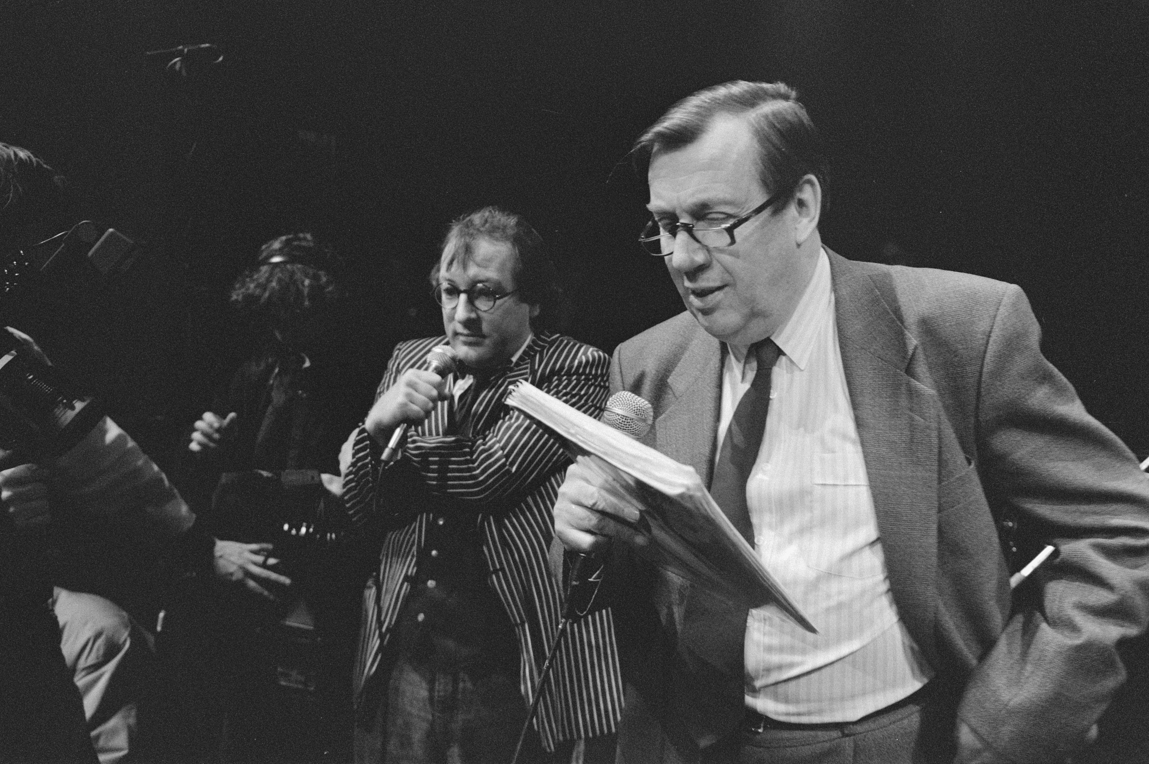 Collectie / Archief : Fotocollectie Anefo Reportage / Serie : [ onbekend ] Beschrijving : Actie Youp van 't Hek in de Kleine Komedie i.v.m. sluiting; Youp van 't Hek (l) in discussie met PvdA-raadslid Cnoop Koopmans Datum : 22 februari 1988 Locatie : Amsterdam Trefwoorden : cabaretiers, schouwburgen Persoonsnaam : Hek, Youp van 't Fotograaf : Croes, Rob C. / Anefo Auteursrechthebbende : Nationaal Archief Materiaalsoort : Negatief (zwart/wit) Nummer archiefinventaris : bekijk toegang 2.24.01.05 Bestanddeelnummer : 934-1944